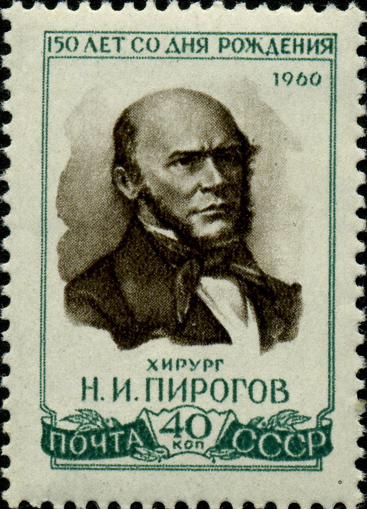 Марка СССР. ЦФА 2504. Портрет Н. И. Пирогова